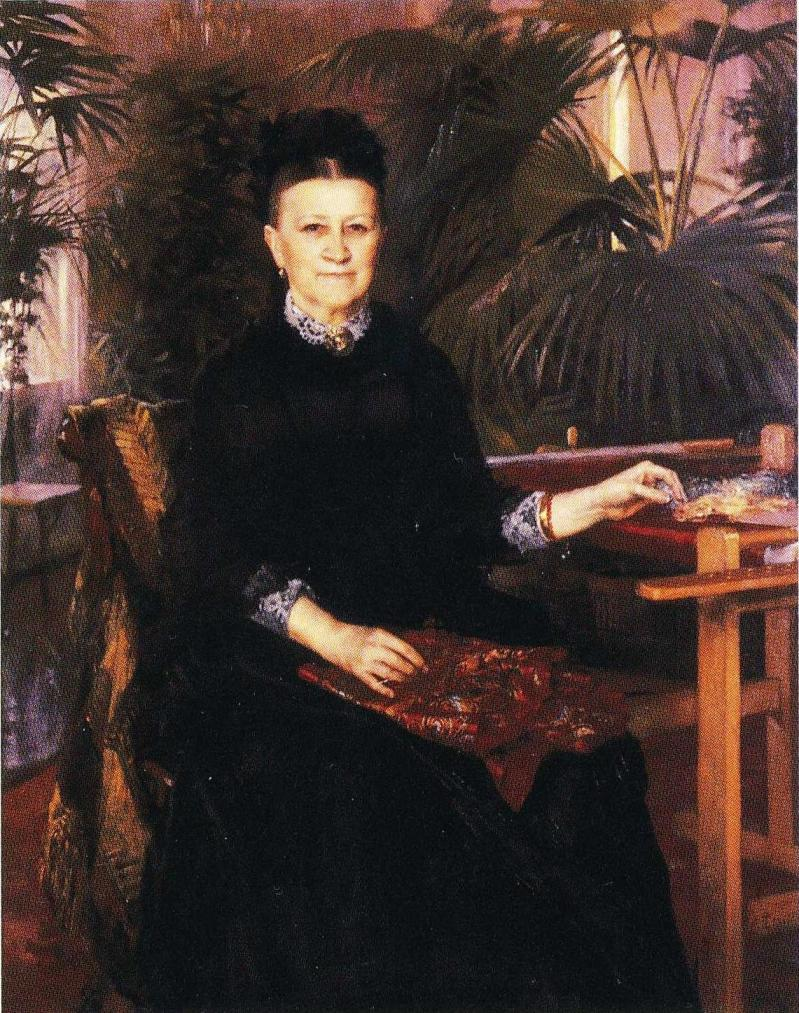 Kauppaneuvoksetar Anna Sinebrychoff (1830–1904).